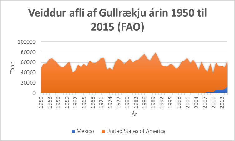 Veiddur aflir af Gullrækju frá árinu 1950 til 2015.